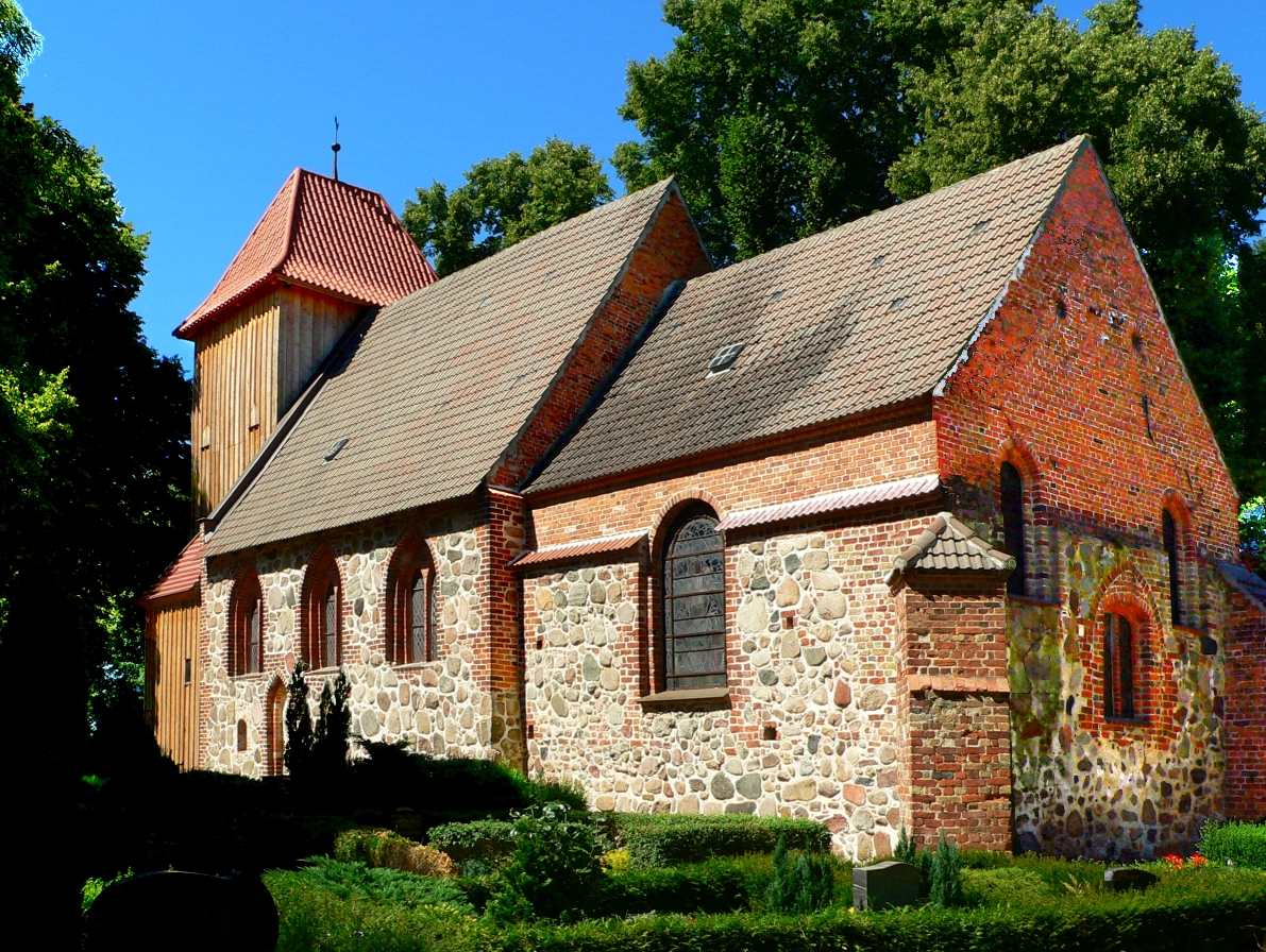 Kirche in Biendorf, Landkreis Bad Doberan